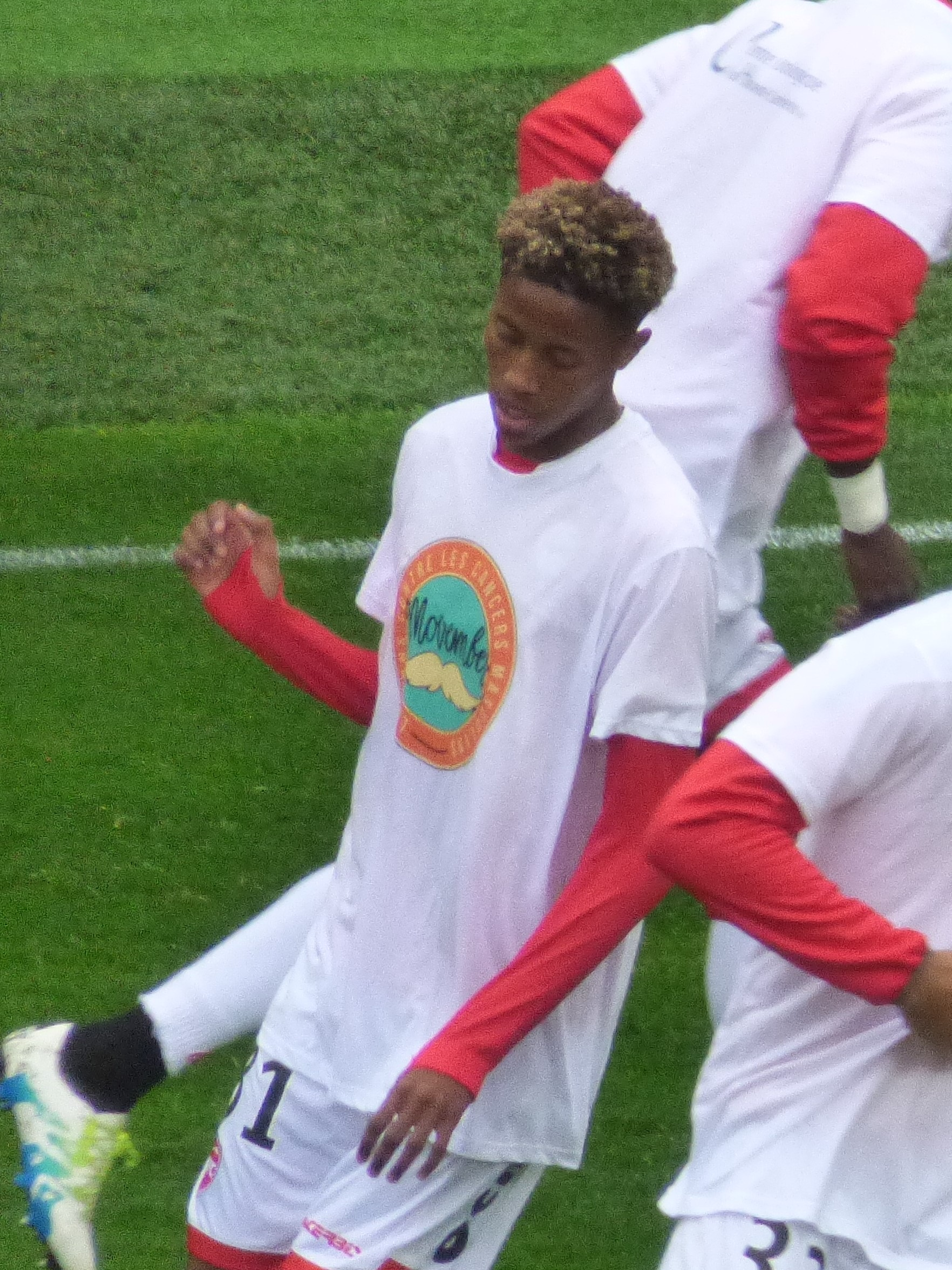 Kévin Cabral avant le match Valenciennes FC / RC Lens, comptant pour la quatorzième journée du championnat de France de Ligue 2 2018-2019, le 10 novembre 2018, au Stade du Hainaut.